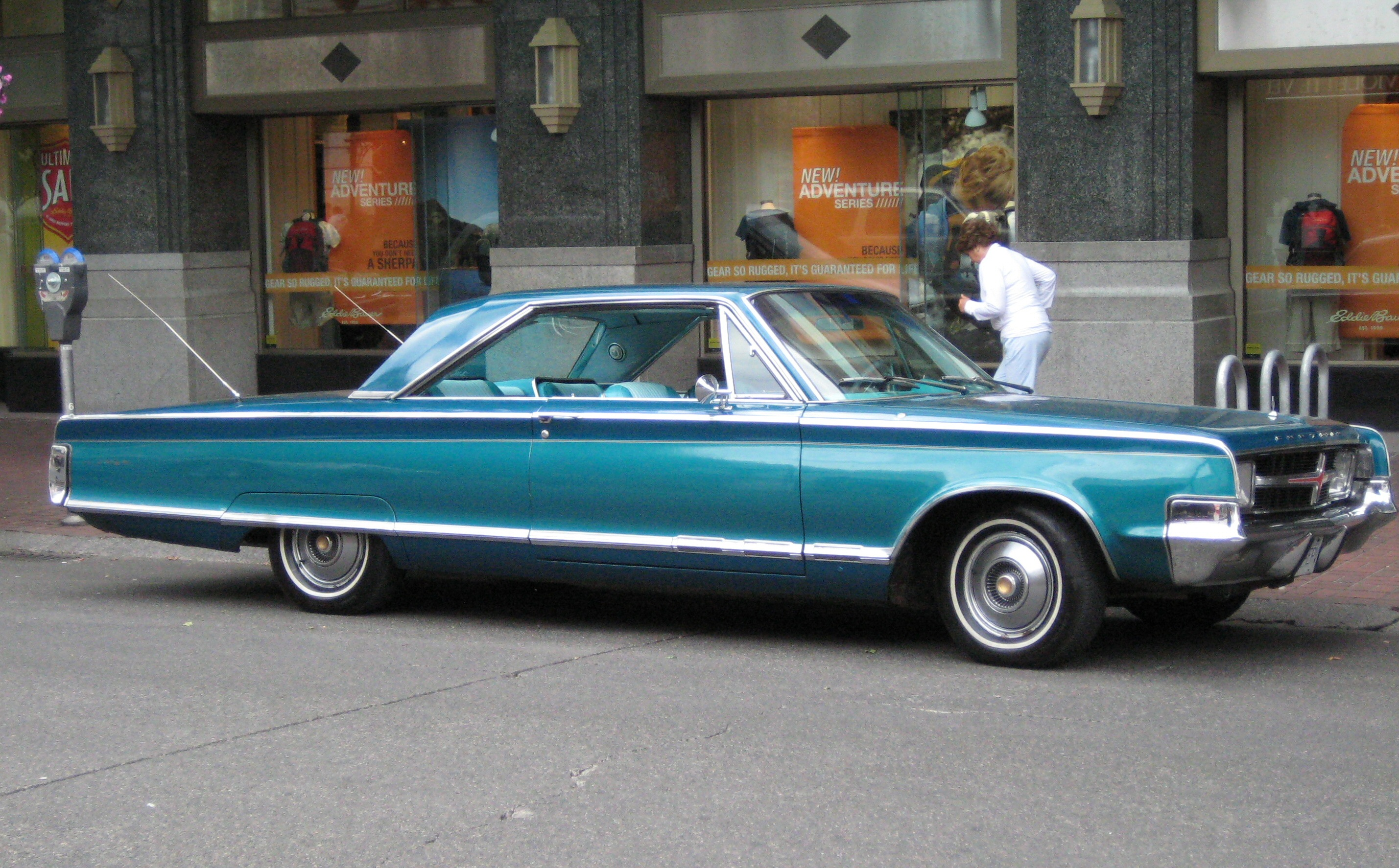 Victoria B.C.